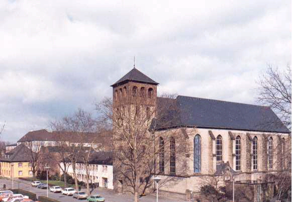 Propsteikirche St. Johann